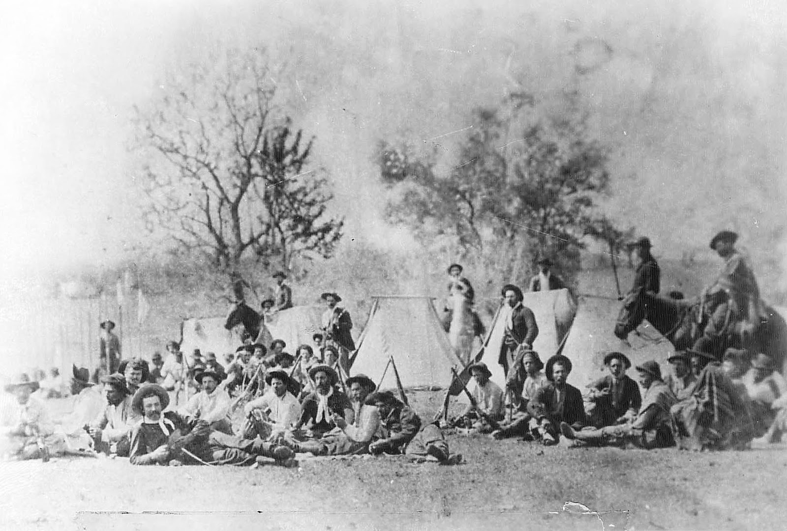 Tropas gaúchas mobilizadas durante a Revolução federalista de 1895